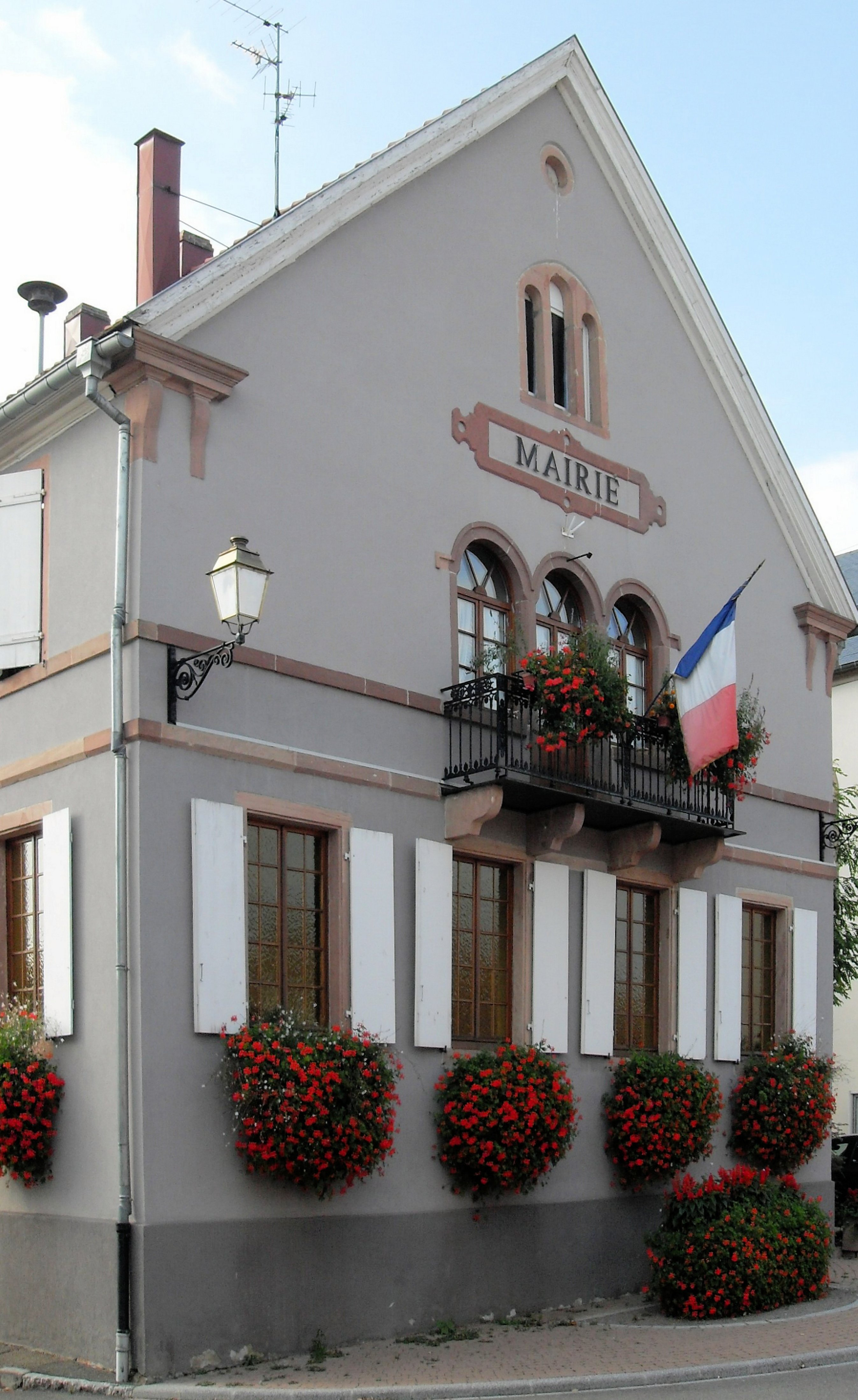 La mairie d'Elsenheim